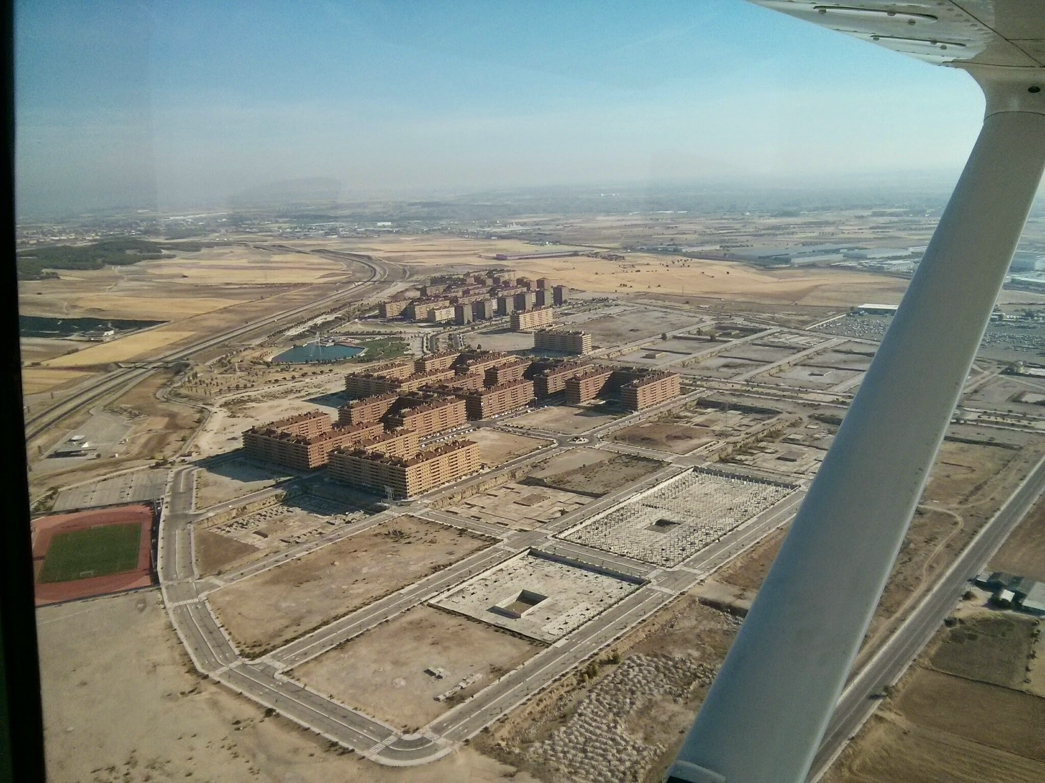 Vista aerea de El Quiñón (en Seseña), conocida tambien como "la ciudad del pocero"